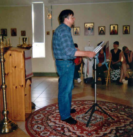 Bengt Pohjanen håller en föreläsning för studerande i finska från Uleåborgs universitet i sitt hem, tillika ortodox kyrka i Överkalix i juli 2004. En bild tagen av Harri Blomberg.